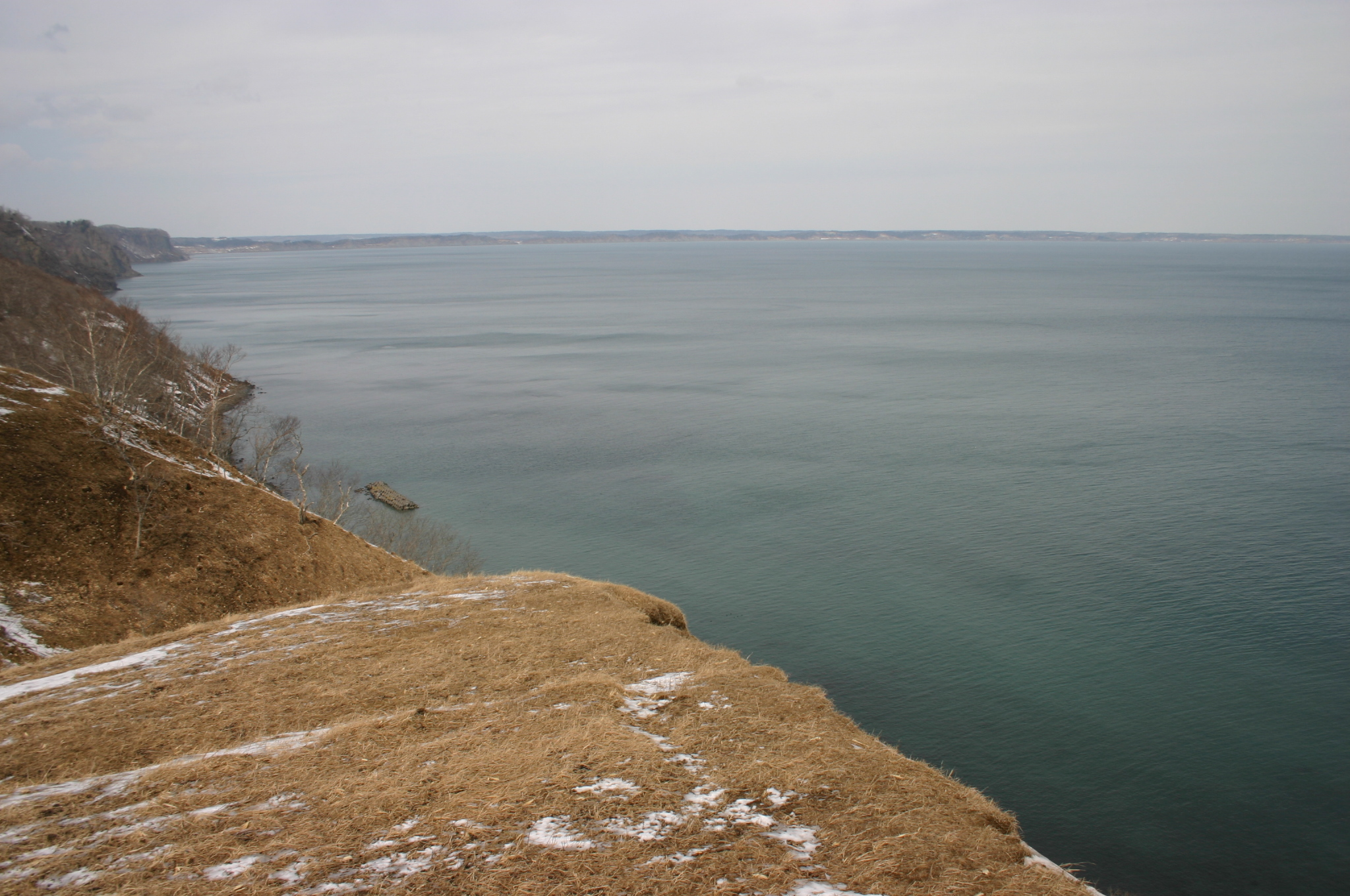 厚岸湾 尻羽岬より